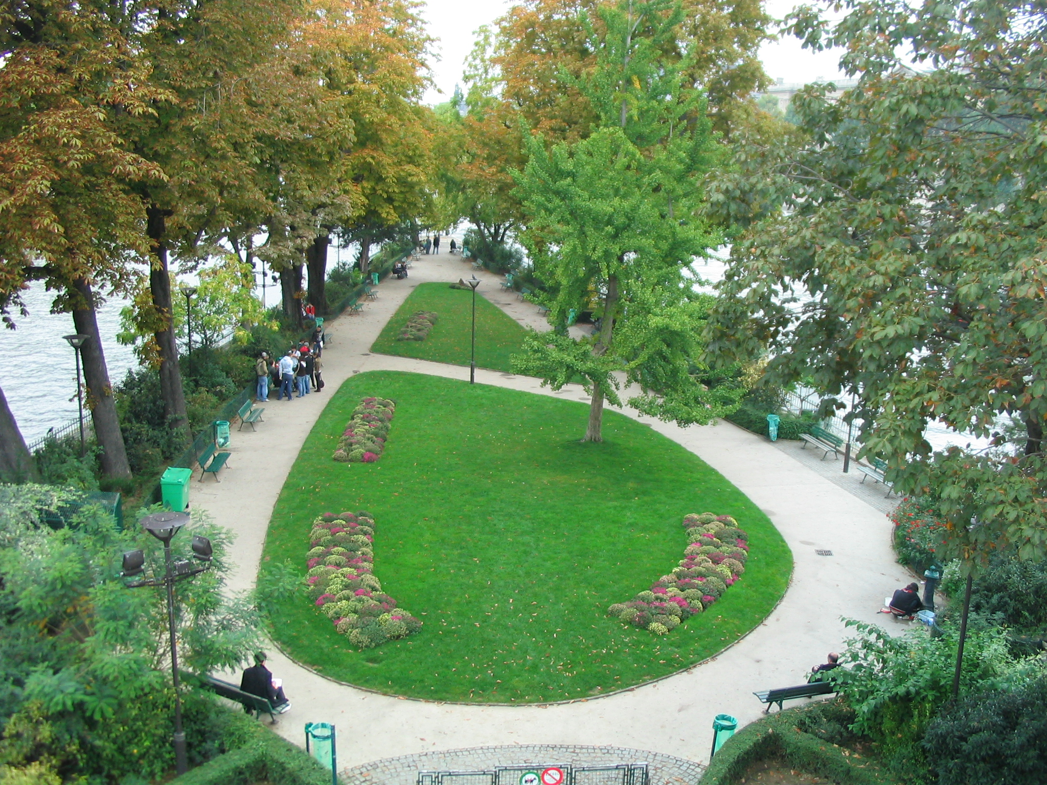 Le square du Vert Galant, à la pointe Ouest de l'île de la Cité.